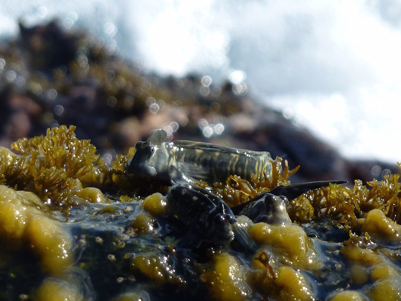 Alticus monochrus observed in Mauritius